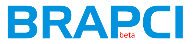 Logo da Brapci